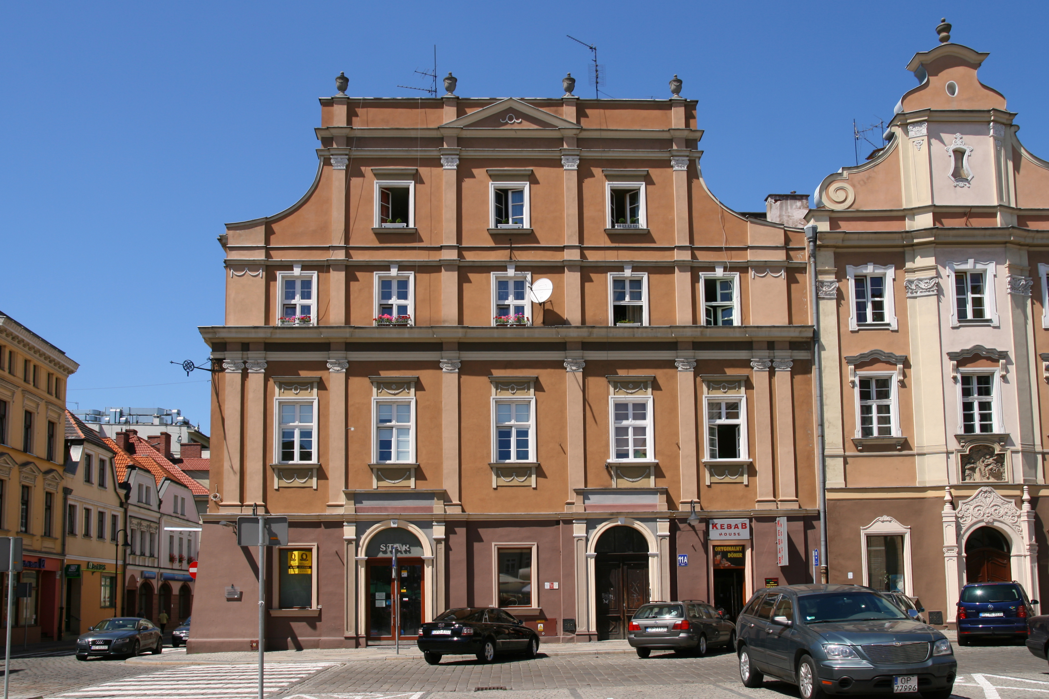 Kamienica przy rynku w Opolu.